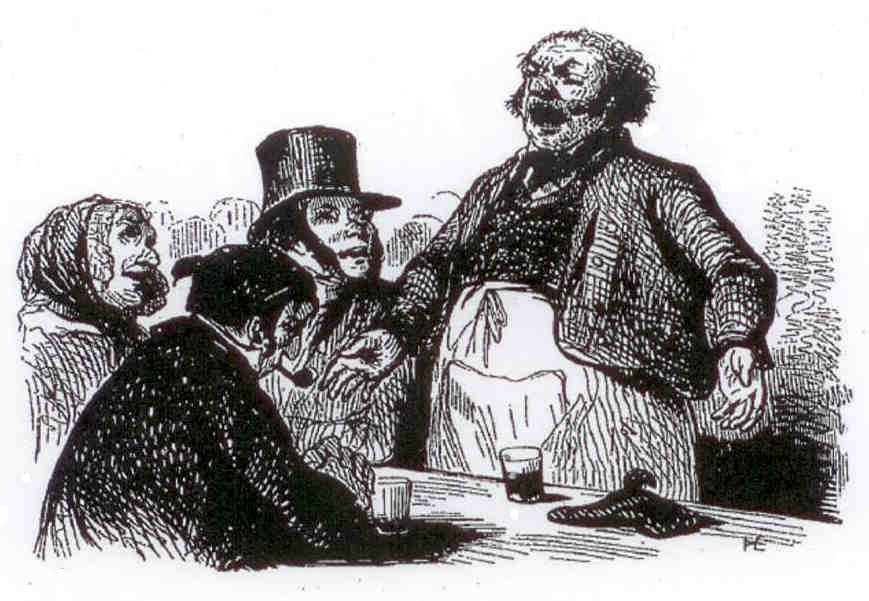 Goguettiers parisiens.